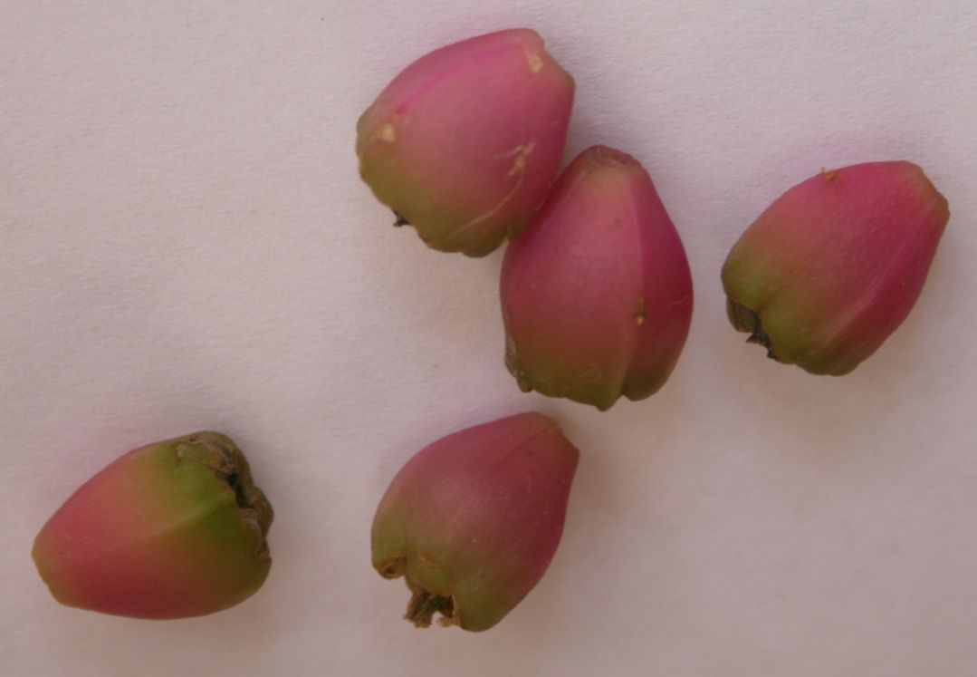 Schlumbergera truncata (Rhipsalideae; Cactaceae; Planta) kaktusz 'Malissa' változatának termése